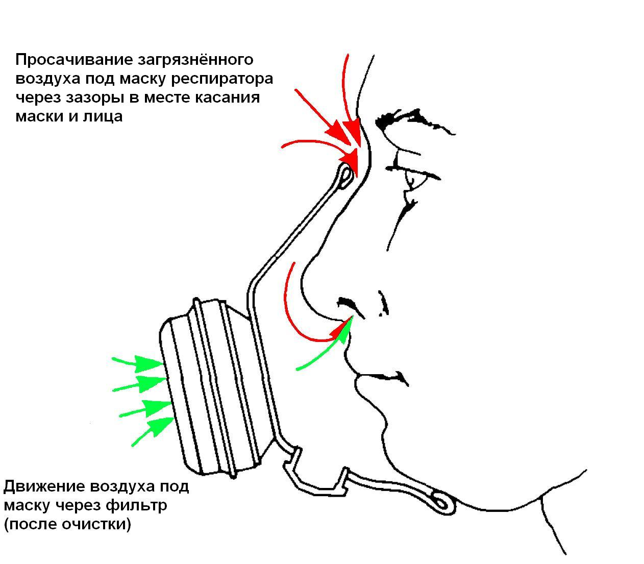 Этот файл содержит иллюстрацию того, как происходит попадание загрязнённого воздуха в организм рабочего, использующего респиратор при просачивании неотфильтрованного воздуха через зазоры в месте касания маски и лица. Файл будет использоваться для иллюстрирования статьи о респираторах